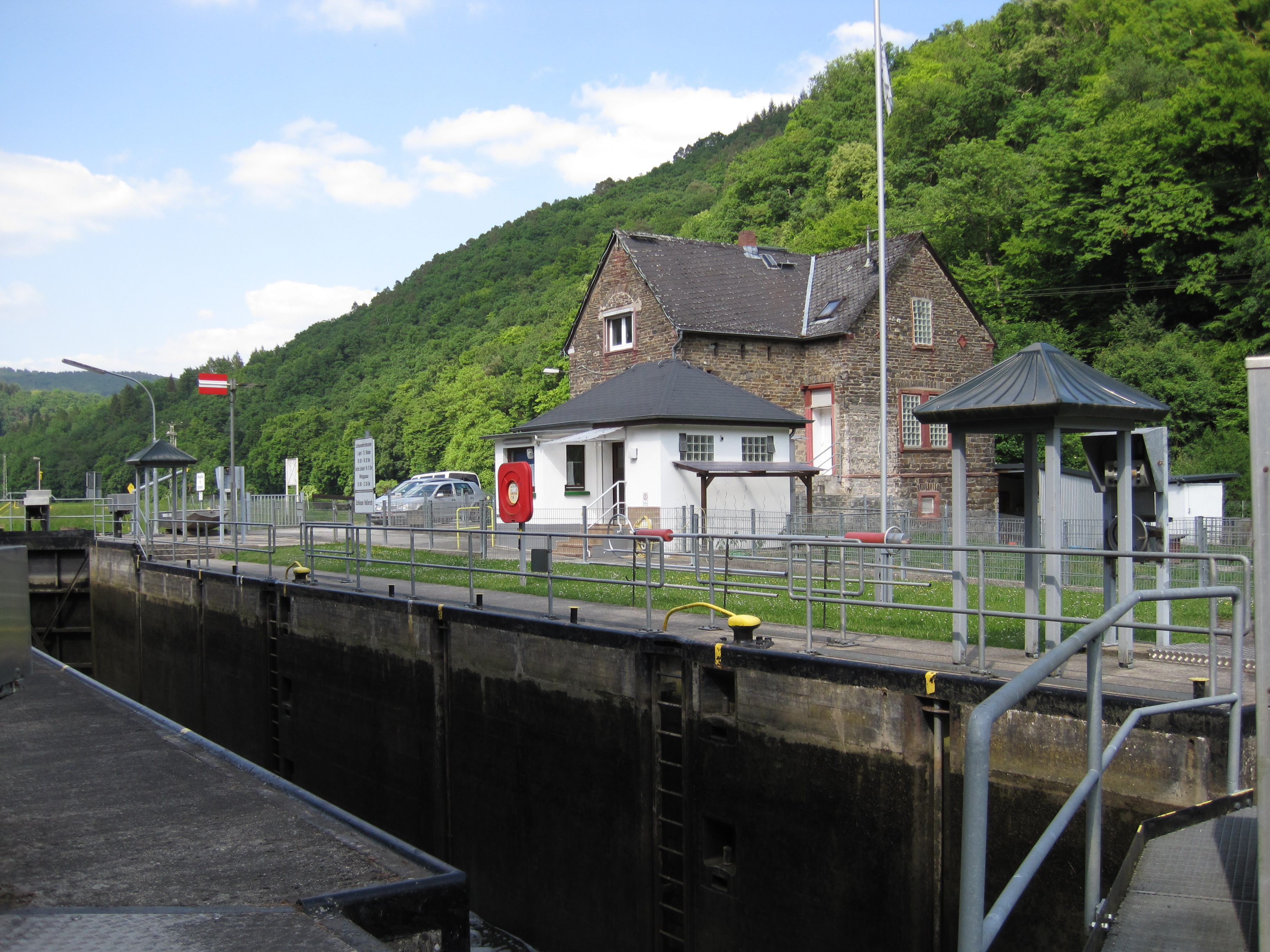 Schleusenanlage Hollerich an der Lahn bei Lahn-km 113,1. Entstanden von 1856 bis 1859.